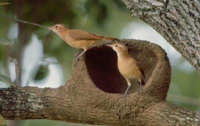 joao de barro (Furnarius rufus) em guanandi